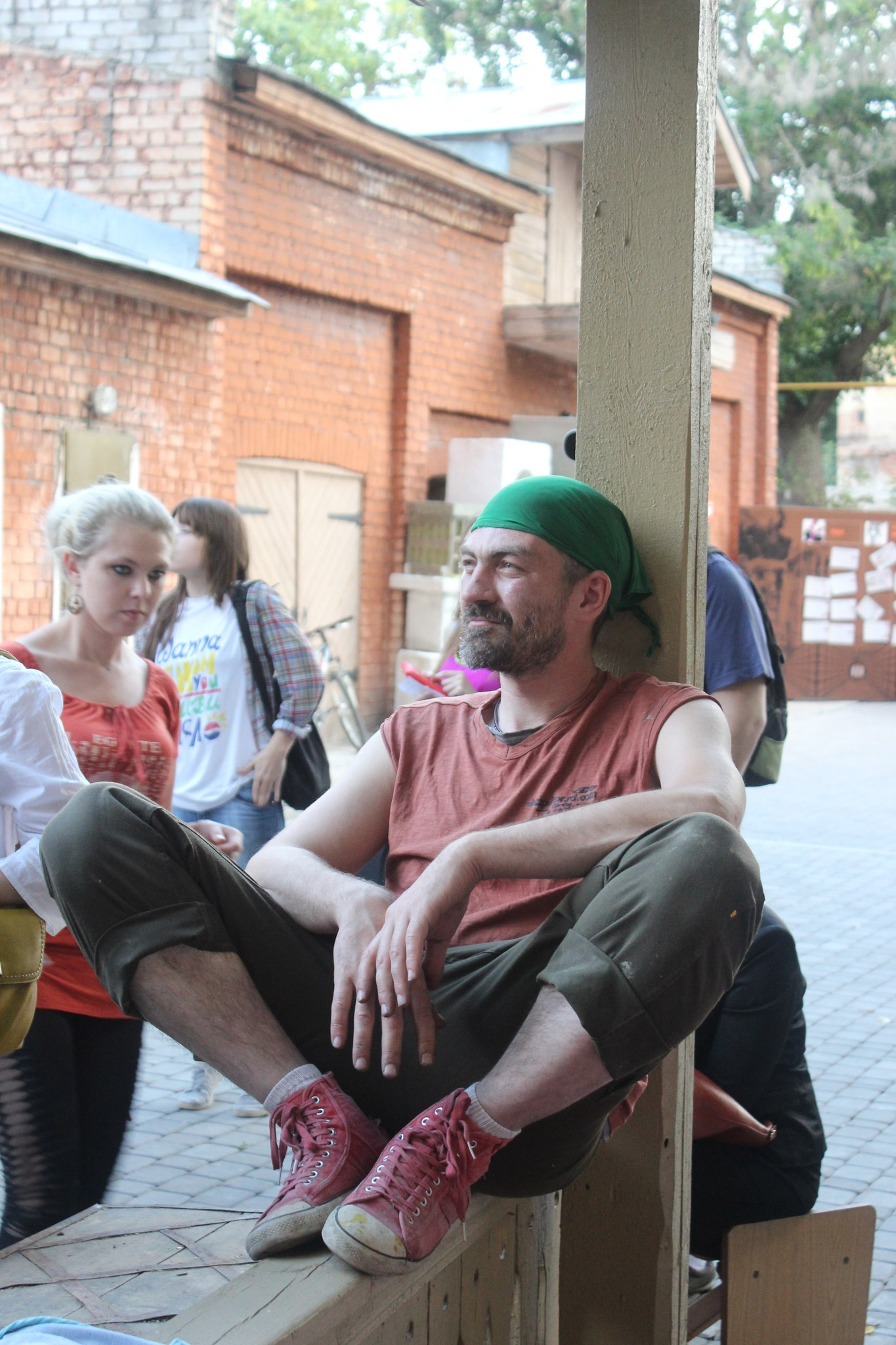 Фрол Веселый 2013, Самарский литературный музей